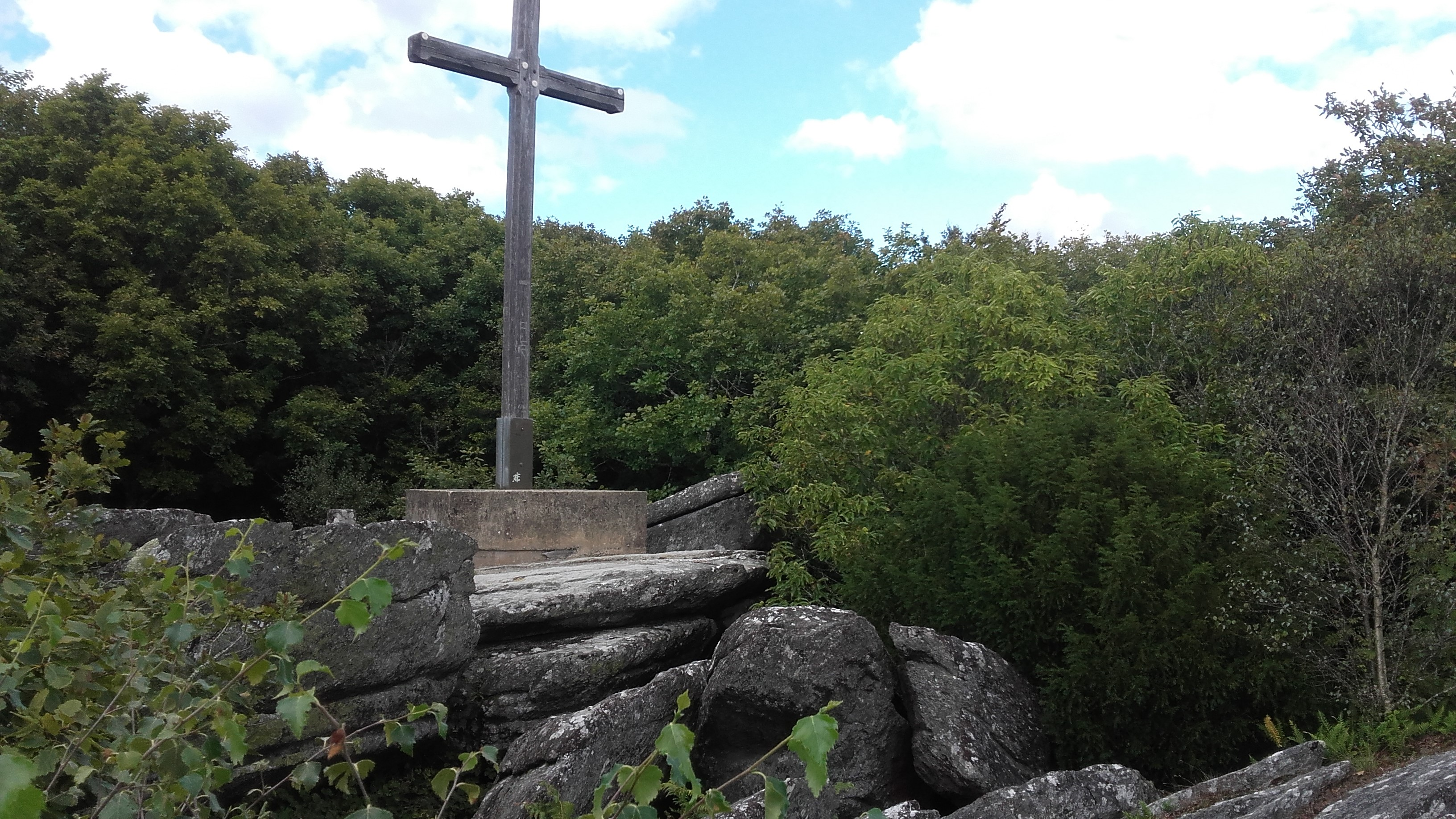 Calvaire situé au sommet du Breuil du Chêne (281 mètres), point culminant de la forêt de Quénécan